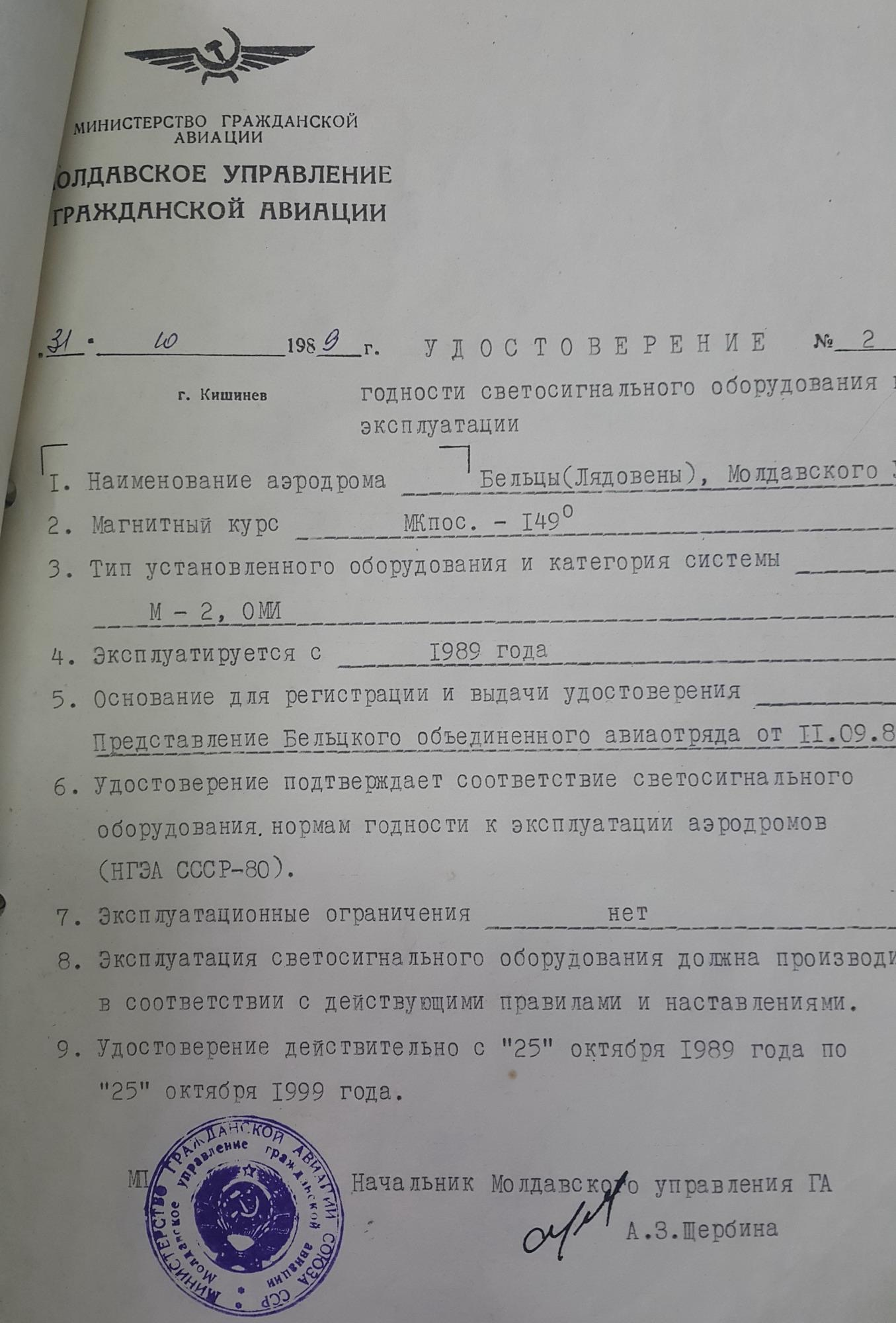 Удостоверение годности свето-сигнального оборудования эксплуатации аэропорта Бельцы-Лядовены